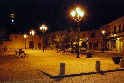 Piazza della chiesa S.S. Pietro e Paolo